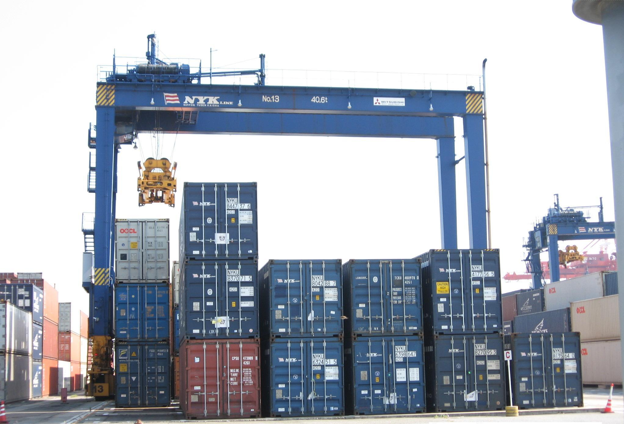 関連資料画像。